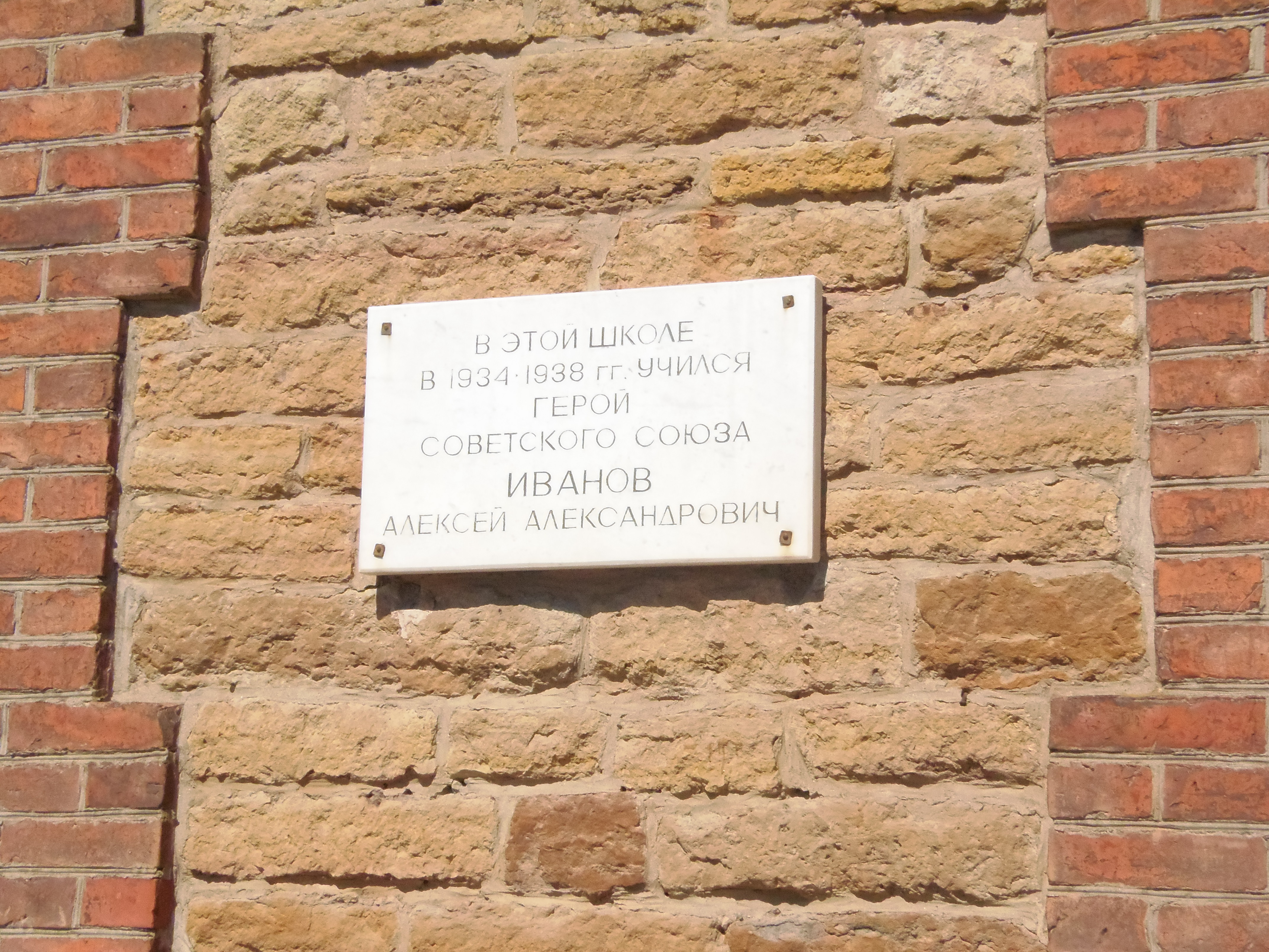 Мемориальная доска на здании школы, где учился Герой Советского Союза Иванов Алексей Александрович